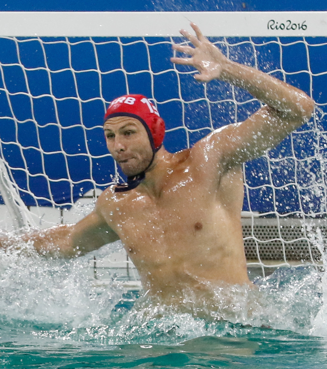 Rio de Janeiro - Seleção masculina brasileira de polo aquático vence a da Sérvia por 6 a 5 nos Jogos Olímpicos Rio 2016, no Parque Aquático Maria Lenk (Fernando Frazão/Agência Brasil)